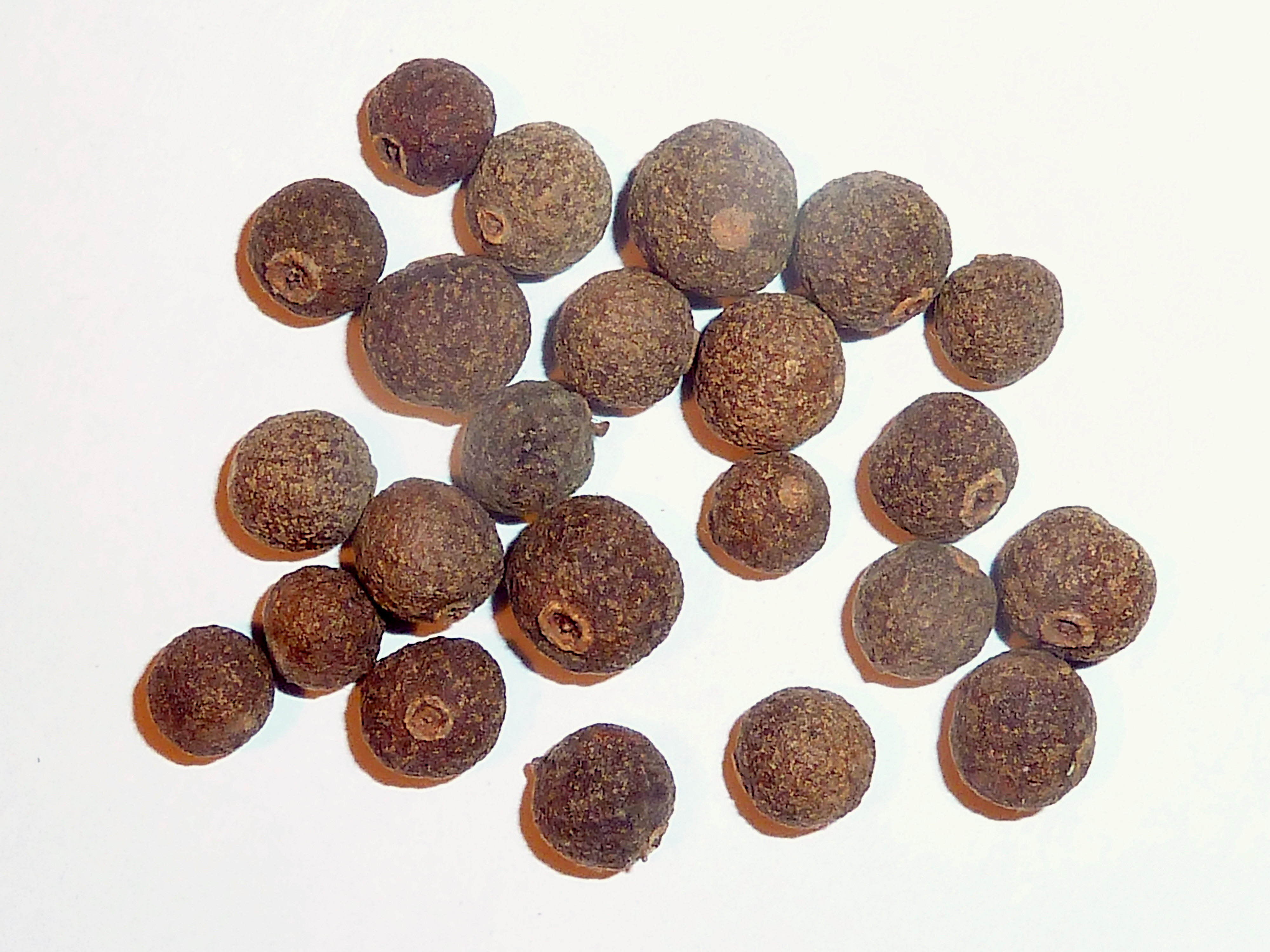 Pimienta racemosa (Malaguetta, bay-rum) . Granos secos (bayas) - Route de Clairière, Fort-de-France (Martinica, Caribe francés).